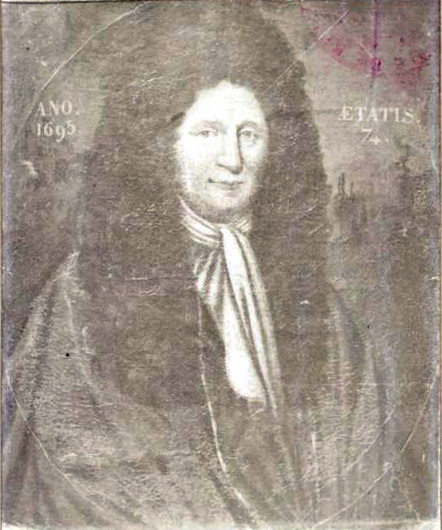 photographie d'un tableau non identifiée du fabuliste.